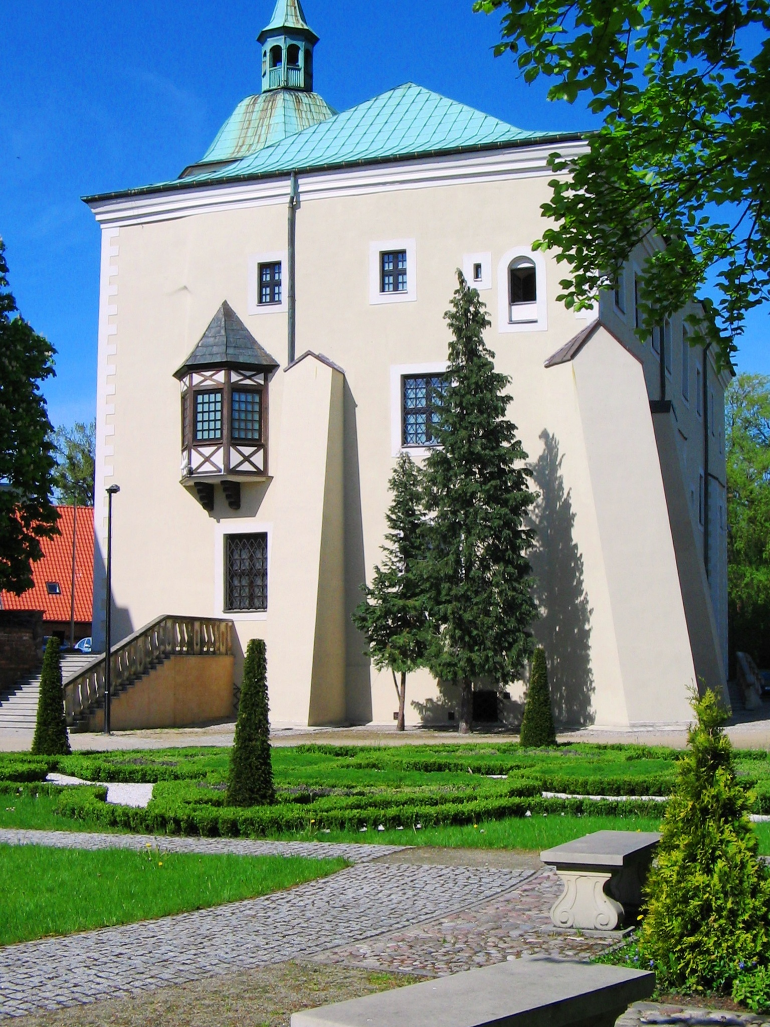 Zamek Książąt Pomorskich wraz z ogrodem zamkowym.